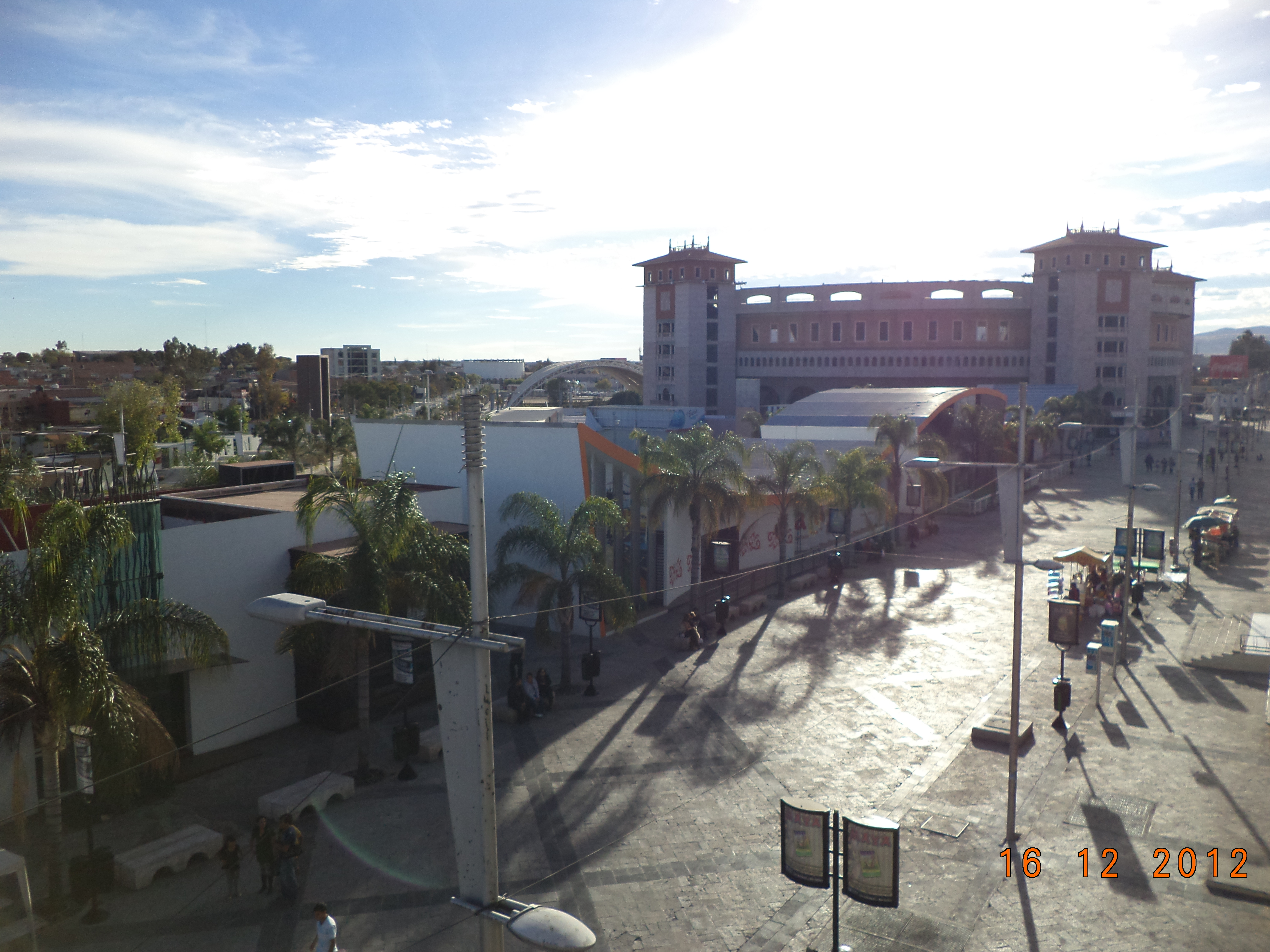 Expoplaza